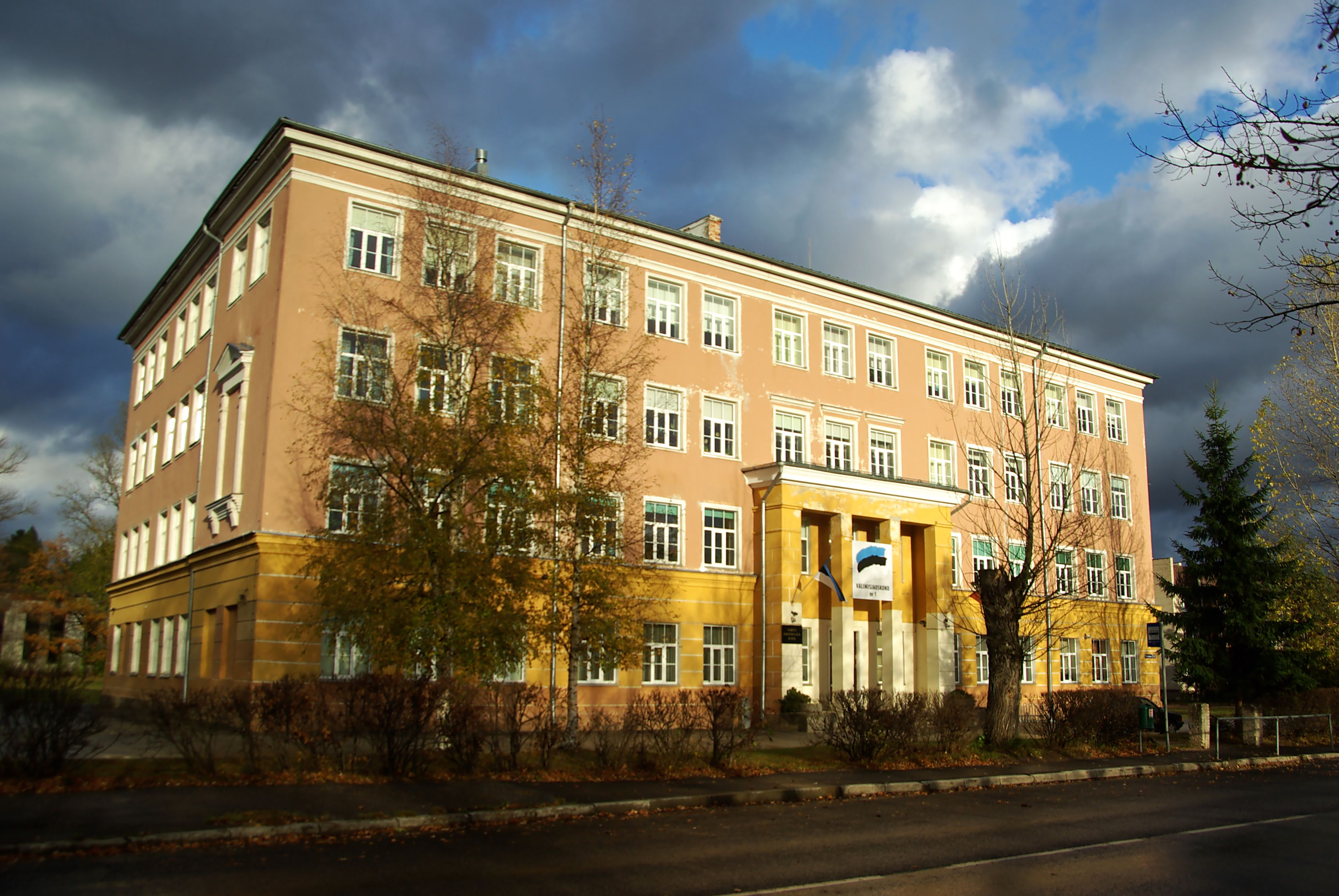 Tartu,Puiestee 62